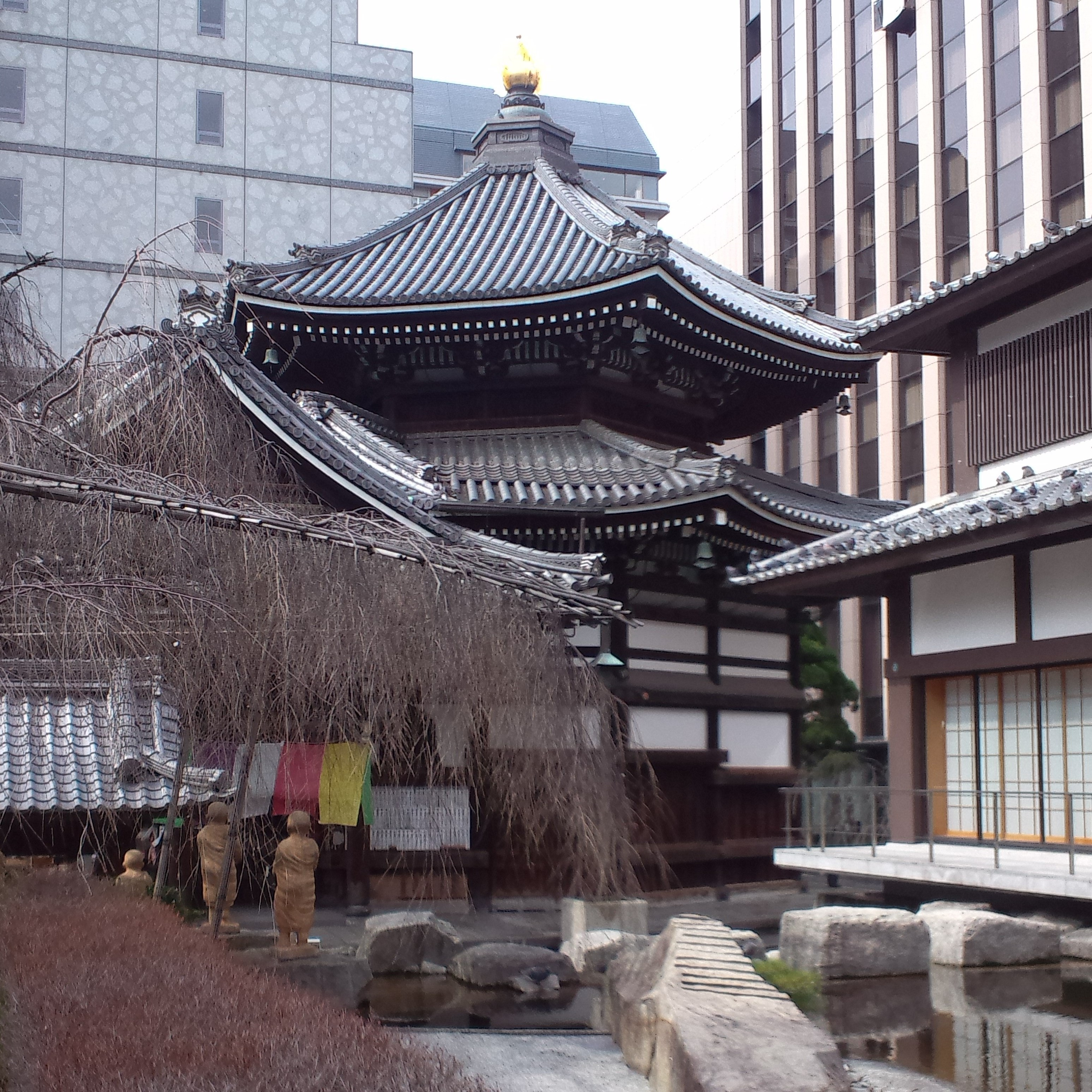 頂法寺 六角堂 本堂